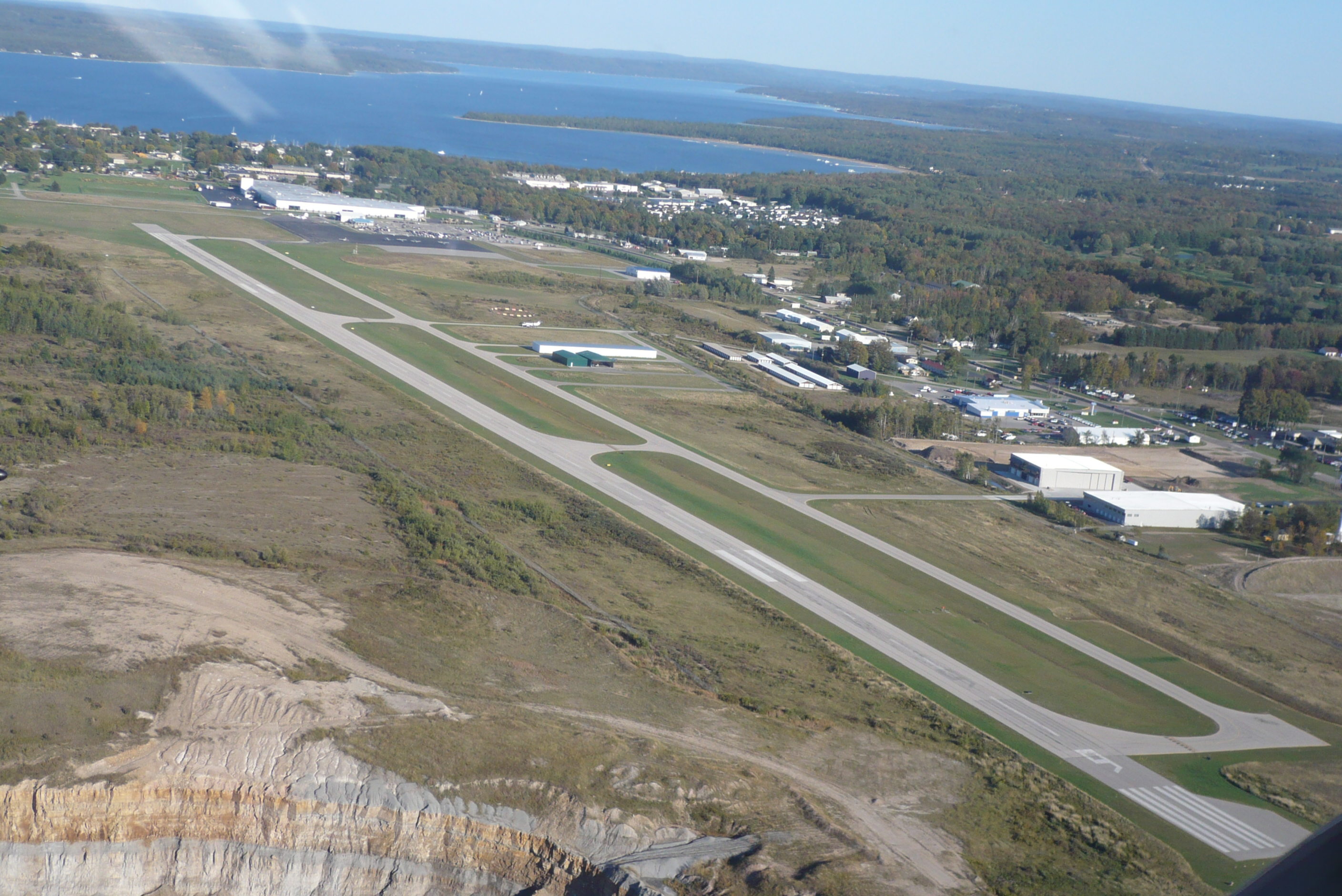 Charlevoix Municipal Airport